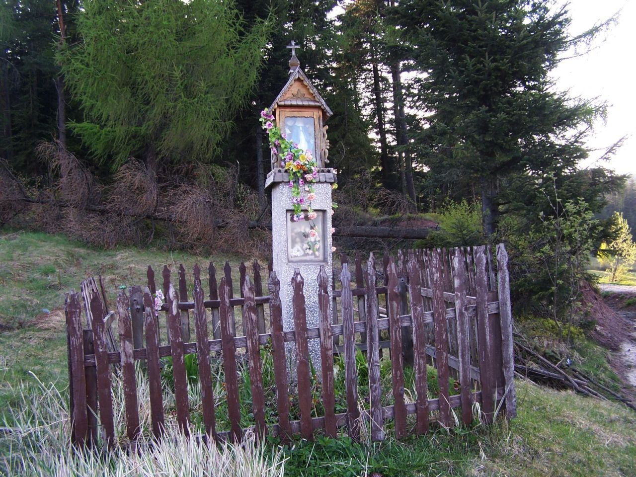 Kapliczka na Przełęczy Słopnickiej